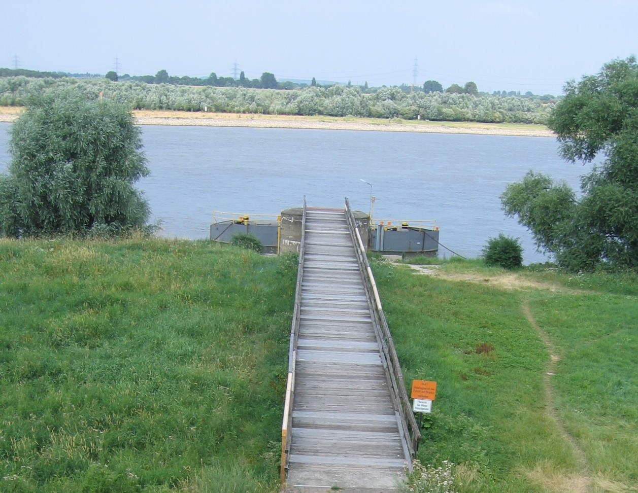 Schiffsanleger Orsoy